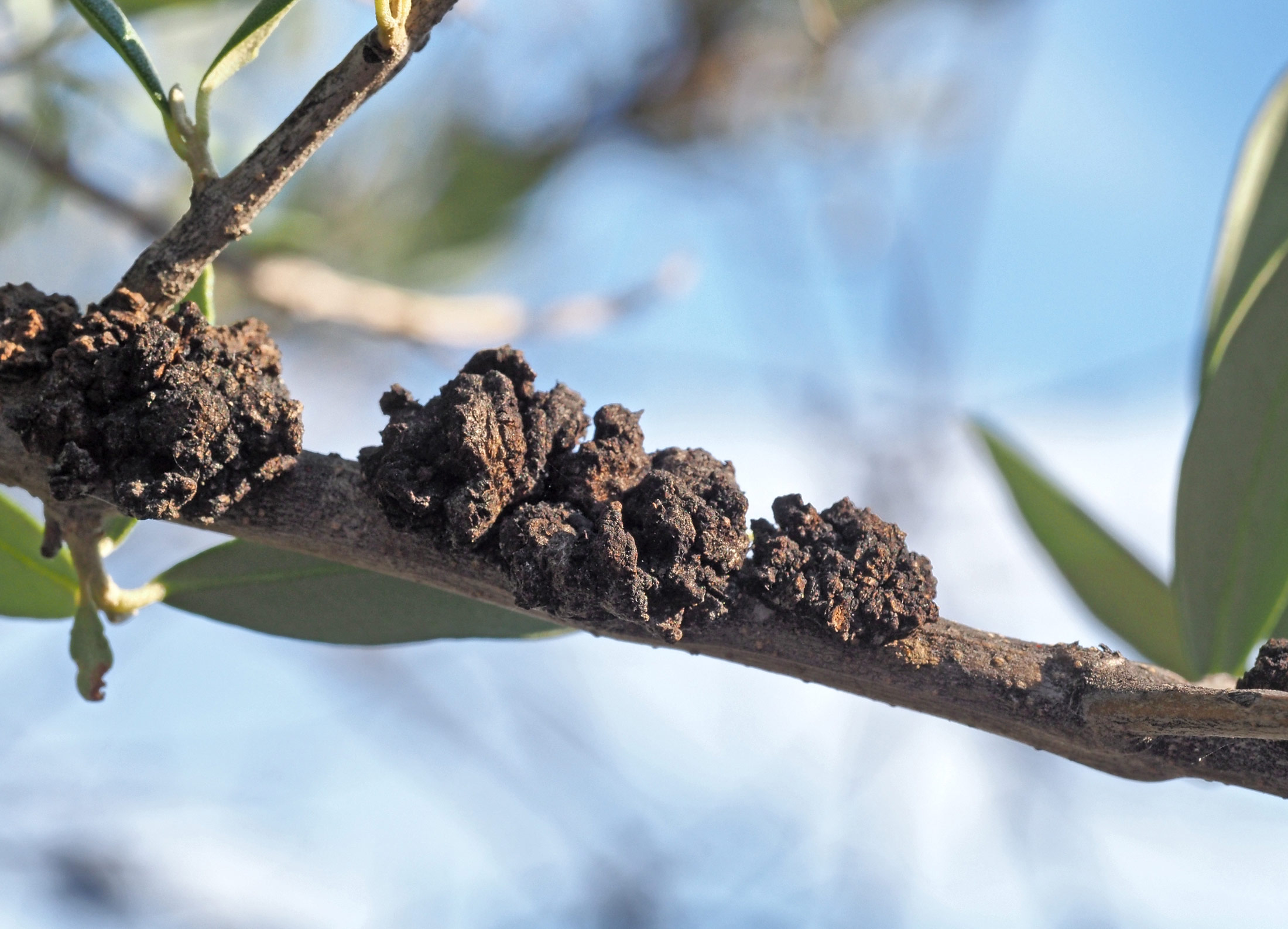 Tumores de Pseudomonas savastanoi en rama de olivo (Olea europaea). Losar de la Vera (Cáceres, España).